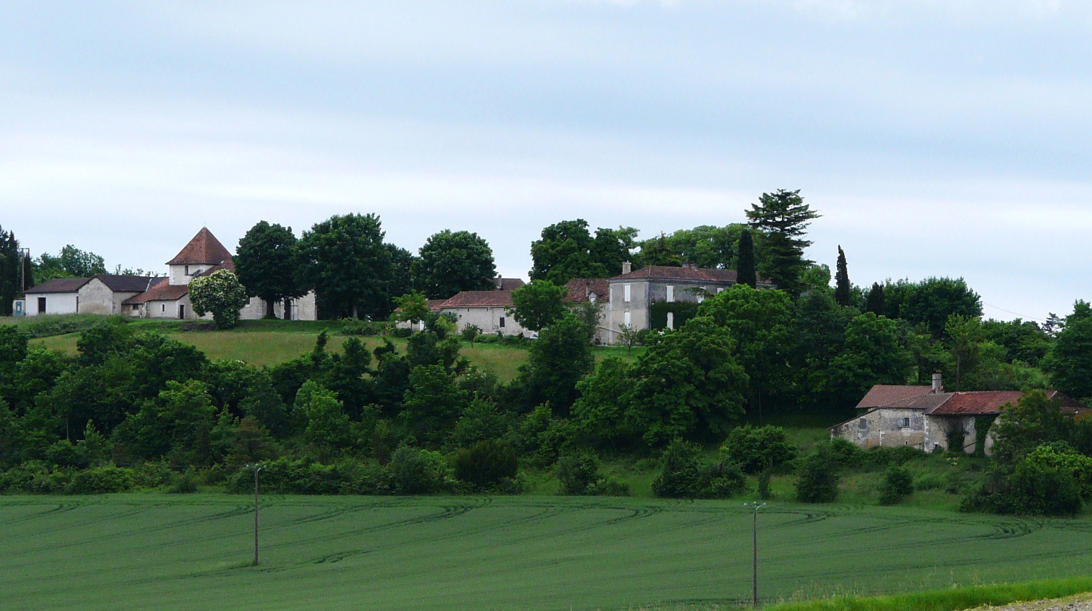 Vue générale de Puy-de-Fouches